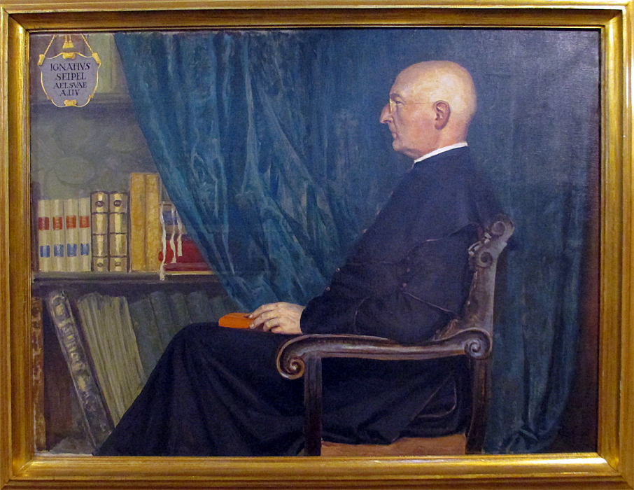 Ignaz Seipel (1876-1932)